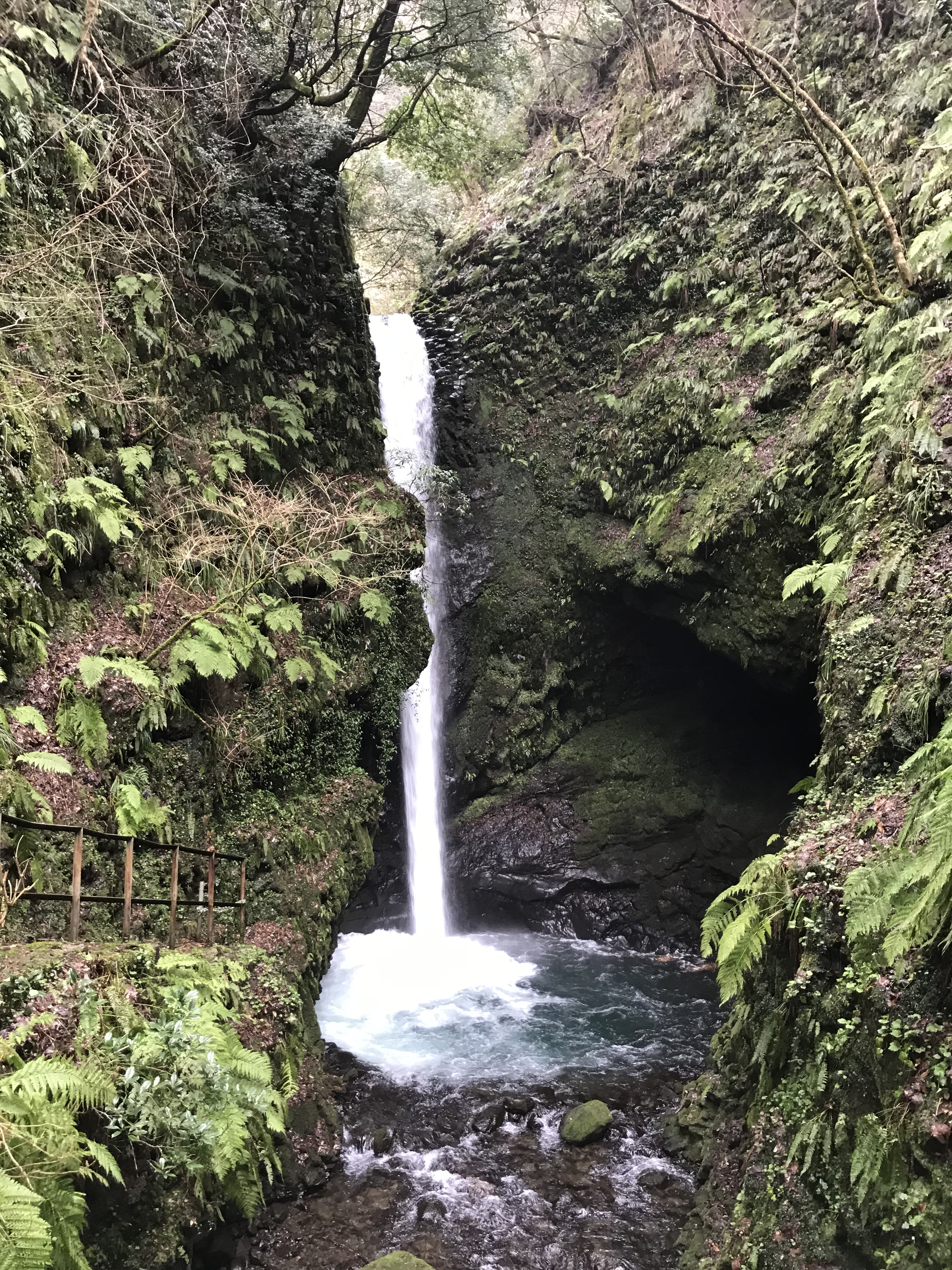 岩室の滝です